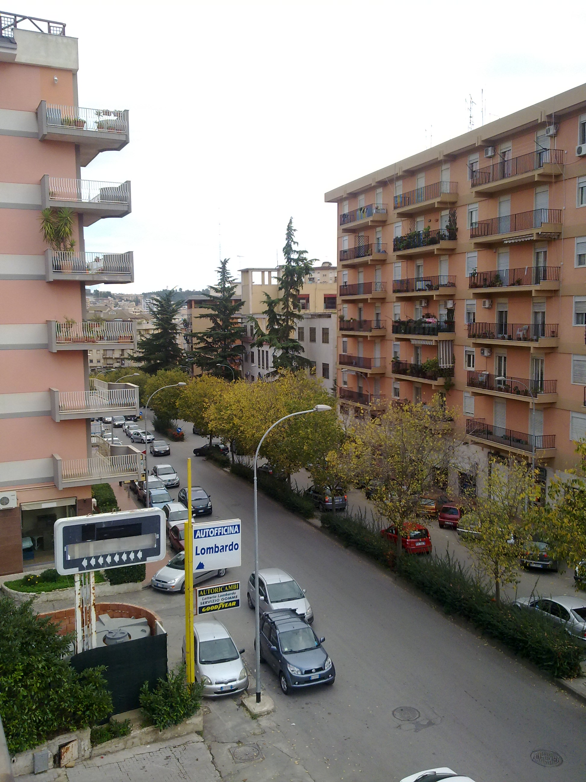 Tratto di Viale Della Regione (Caltanissetta)